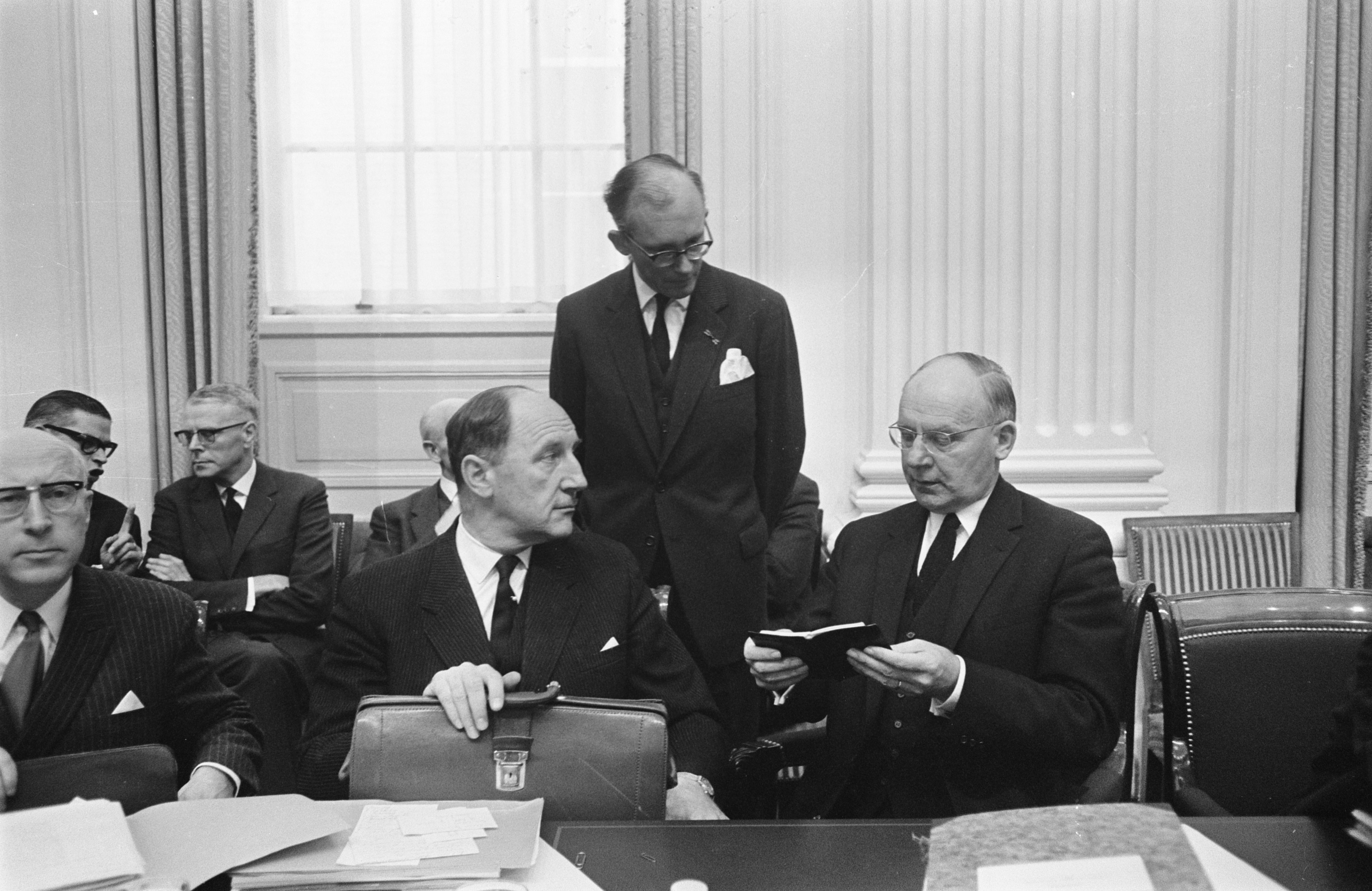 Collectie / Archief : Fotocollectie Anefo Reportage / Serie : De Tweede Kamer tijdens de behandeling van de overheidsbegroting Beschrijving : Links Ivo Samkalden (PvdA), midden minister van Buitenlandse Zaken Joseph Luns (KVP), rechts minister van Financiën Anne Vondeling (PvdA), staand Tweede Kamerlid H.J. Witteveen (VVD) Datum : 12 oktober 1966 Locatie : Den Haag, Zuid-Holland Trefwoorden : overheidsbegrotingen, parlementaire debatten, parlementariërs, politiek Persoonsnaam : Luns, Joseph, Witteveen, H.J. Fotograaf : Fotograaf Onbekend / Anefo Auteursrechthebbende : Nationaal Archief Materiaalsoort : Negatief (zwart/wit) Nummer archiefinventaris : bekijk toegang 2.24.01.05 Bestanddeelnummer : 919-6731